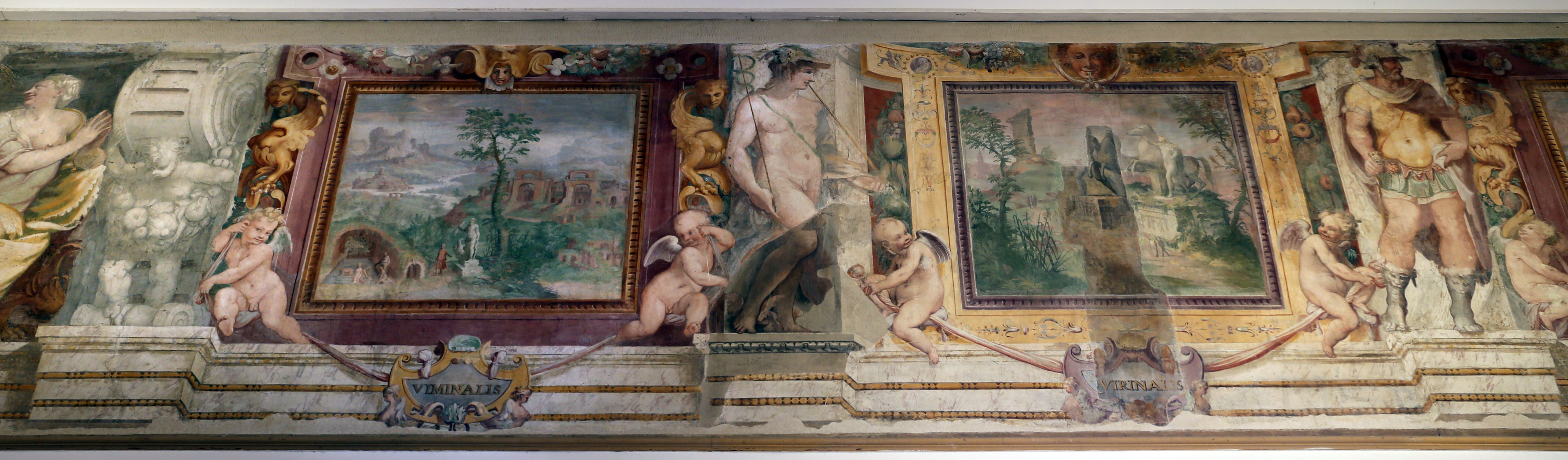 Villa Giulia (Rome) This is a photo of a monument which is part of cultural heritage of Italy.